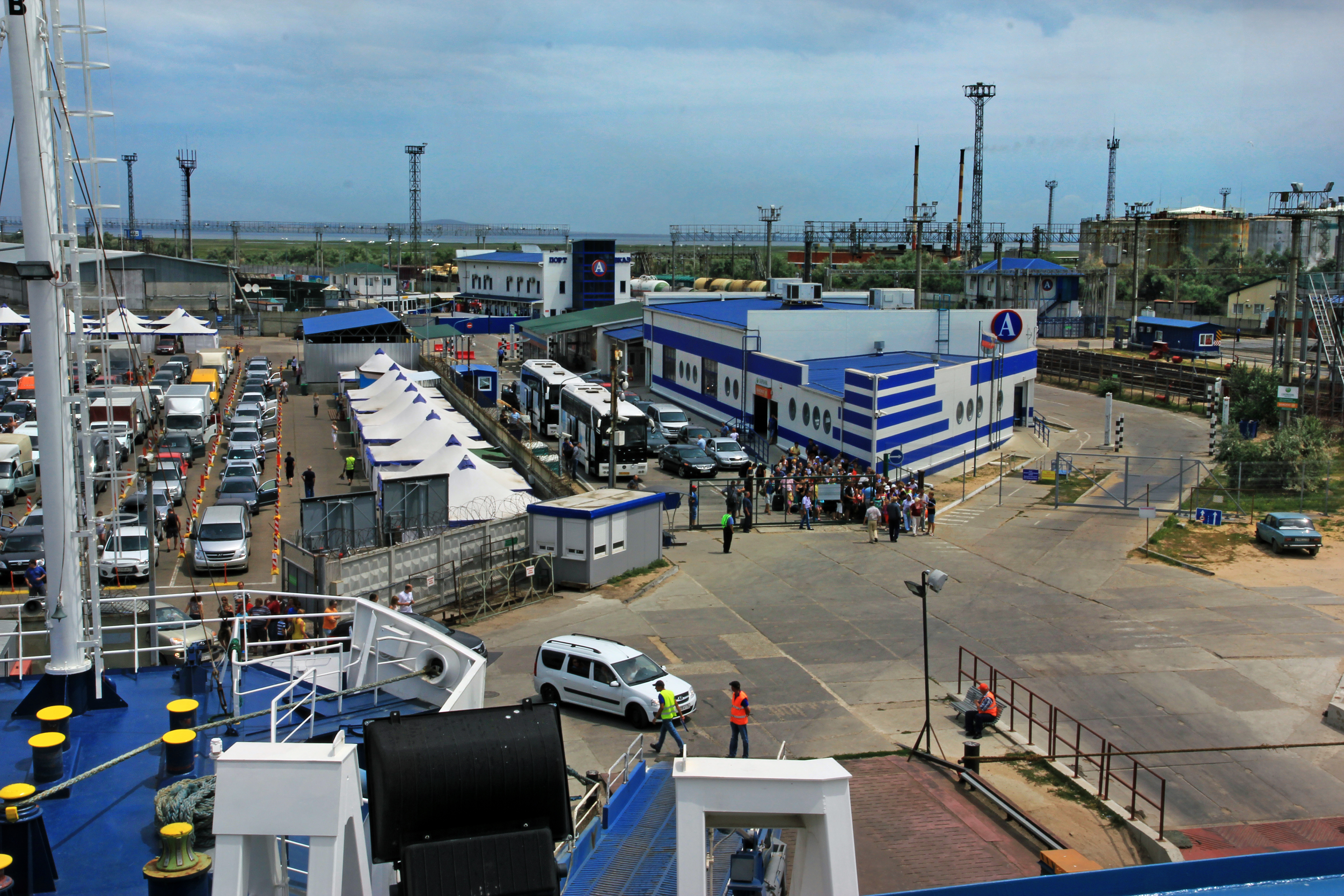 Autode ooteala sadamas Kavkaz 2014.a.